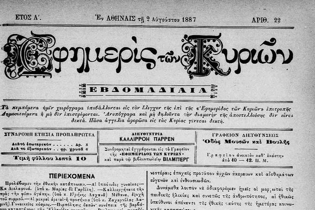 μικρογραφία